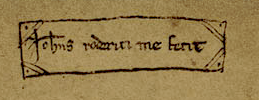 « Johannes Roderici me fecit » sur le le haut du folio 160v du Codex Las Huelgas.